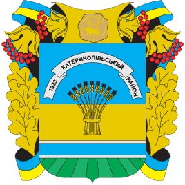 Герб Катеринопільського району